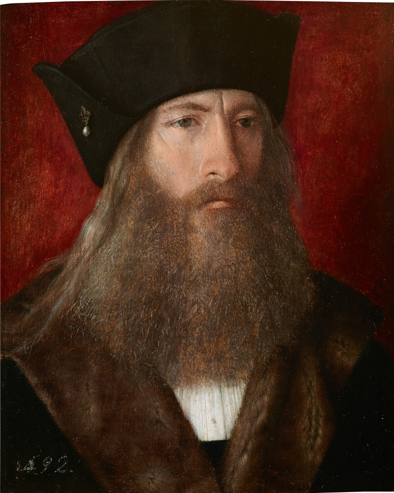 Este retrato sigue los modos de representación privativos del pintor hanseático Michel Sittow, que están muy vinculados al arte flamenco por su aprendizaje en la escuela de Brujas. Esta obra podría ser incluida en el período tardío de la actividad del pintor y aproximadamente en las fechas en que viajó por segunda vez a España pasando por los Países Bajos. El historiador José Luis Sancho ientificó al retratado, y muy acertadamente según algunos autores, con Odet de Foix (1485-1528), conde de Cominges y vizconde de Lautrec, basándose en el gran parecido del personaje con el retrato de cuerpo entero de dicho individuo que se conserva en el Palacio del Senado de Madrid y que procede de la antigua colección del marqués de Leganés.